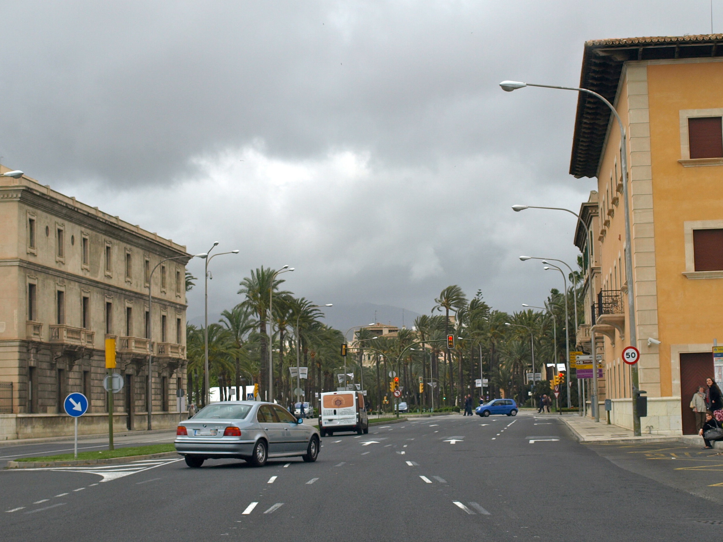 Aduanes i Capitania al Passeig Marítim